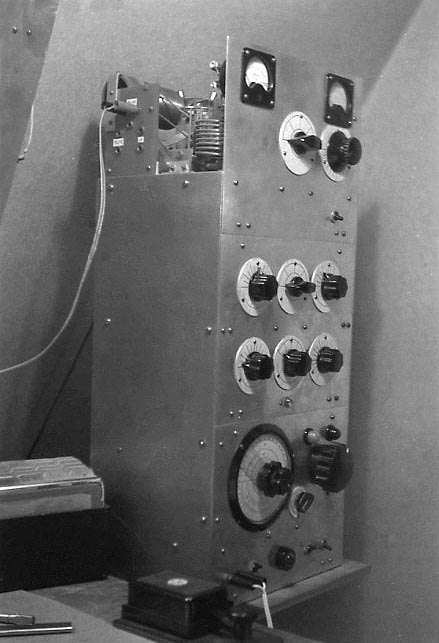 Amateurfunk-Sender in Röhrentechnik, 1957 in Deutschland erbaut. Es sind weltweite Funkkontakte damit nachweisbar. Als Selbstbau-Gerät aus Nachkriegsteilen ist er museal im Förderverein Amateurfunkmuseum erhalten.